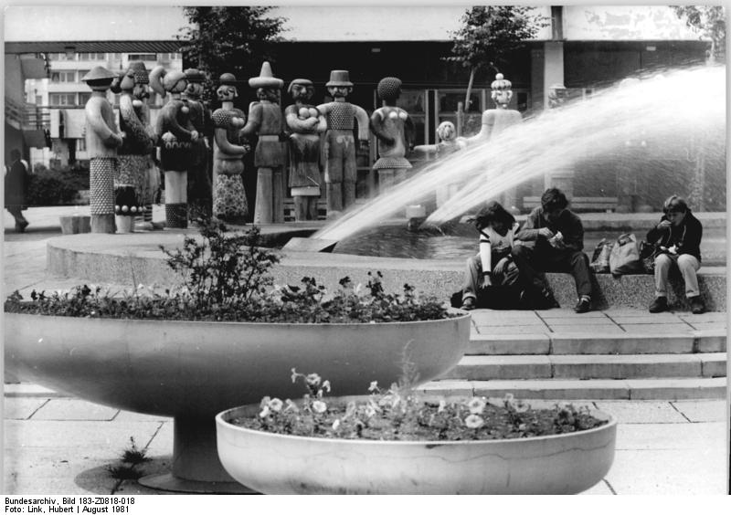 ADN-ZB-Link-18.8.1981-Erfurt: Kunstwerke bereichern das Wohnviertel an der Riethstraße im Neubaugebiet Erfurt-Nord. Zwölf Keramik-Plastiken von Eberhard Heiland zieren diesen Brunnenrand. Sie symbolisieren die Freundschaft der Völker.